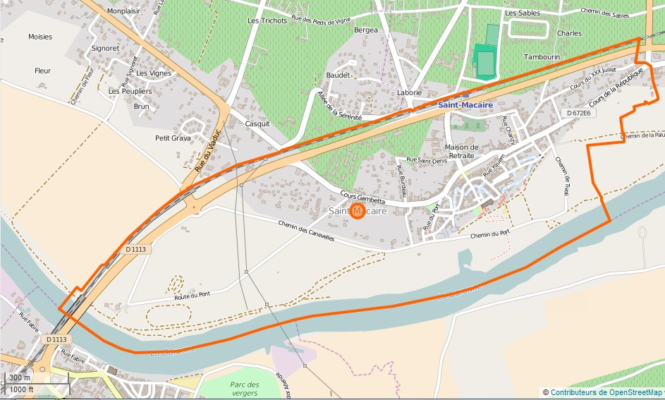 Saint-Macaire Limite de la commune This map may be incomplete, and may contain errors. Don't rely solely on it for navigation.